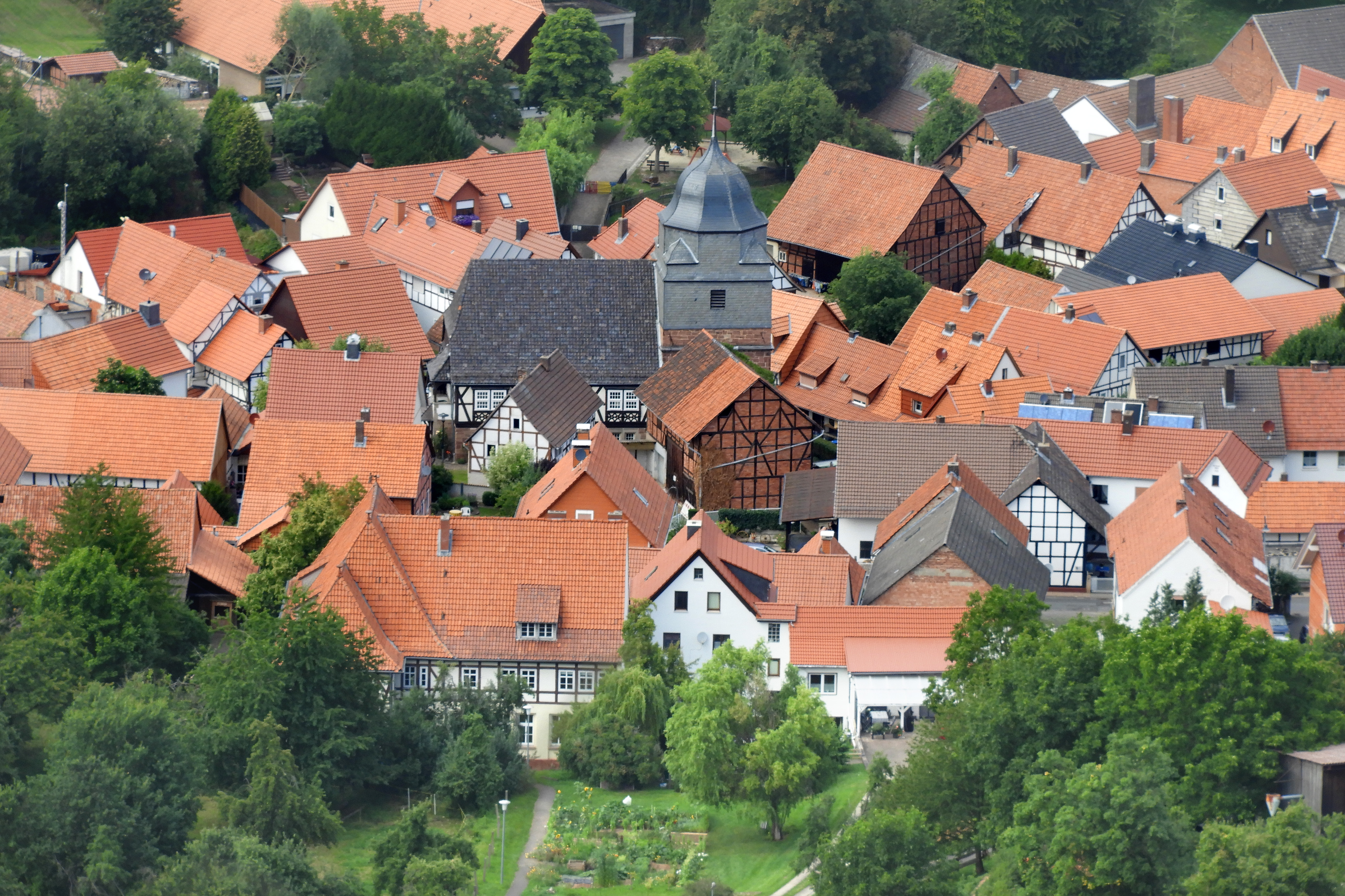 Der älteste Teil der Weißenbörner Pfarrkirche ist der vermutlich 1577 errichtete Chorturm. Die verschieferte Glockenstube mit der abschließenden Haube ist dem Turm 1913 aufgesetzt worden. Im gleichen Jahr wurde das in 1697 angesetzte Kirchenschiff grundlegend erneuert. Die Kirche ist aus künstlerischen, geschichtlichen und baulichen Gründen ein Kulturdenkmal. Weißenborn ist eine Gemeinde im nordhessischen Werra-Meißner-Kreis.